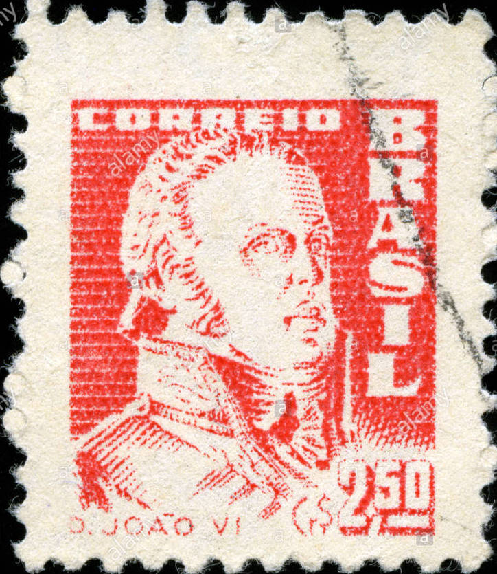 João VI o Clemente